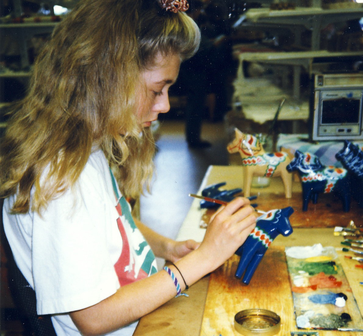 Tillbverkning av Dalahästen, blåa varianten